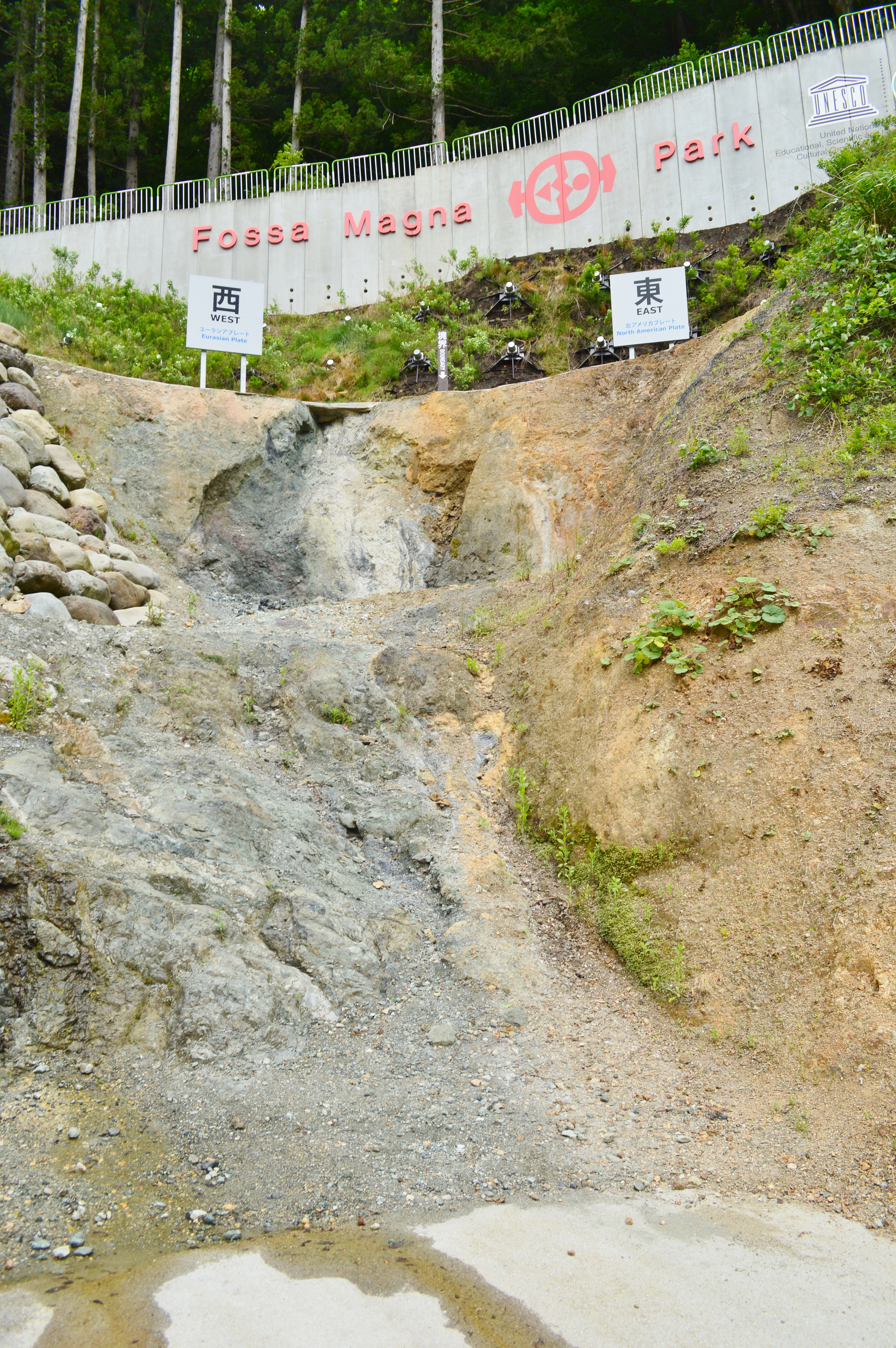 フォッサマグナパーク 糸魚川静岡構造線露頭